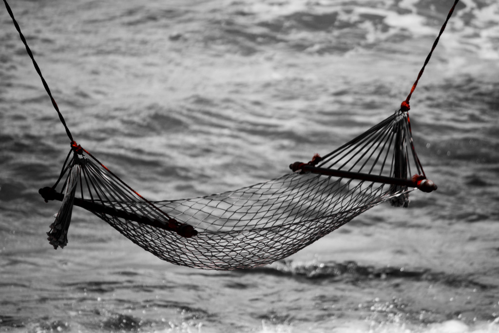 Hammock taken from Malaysia/Sri Lanka